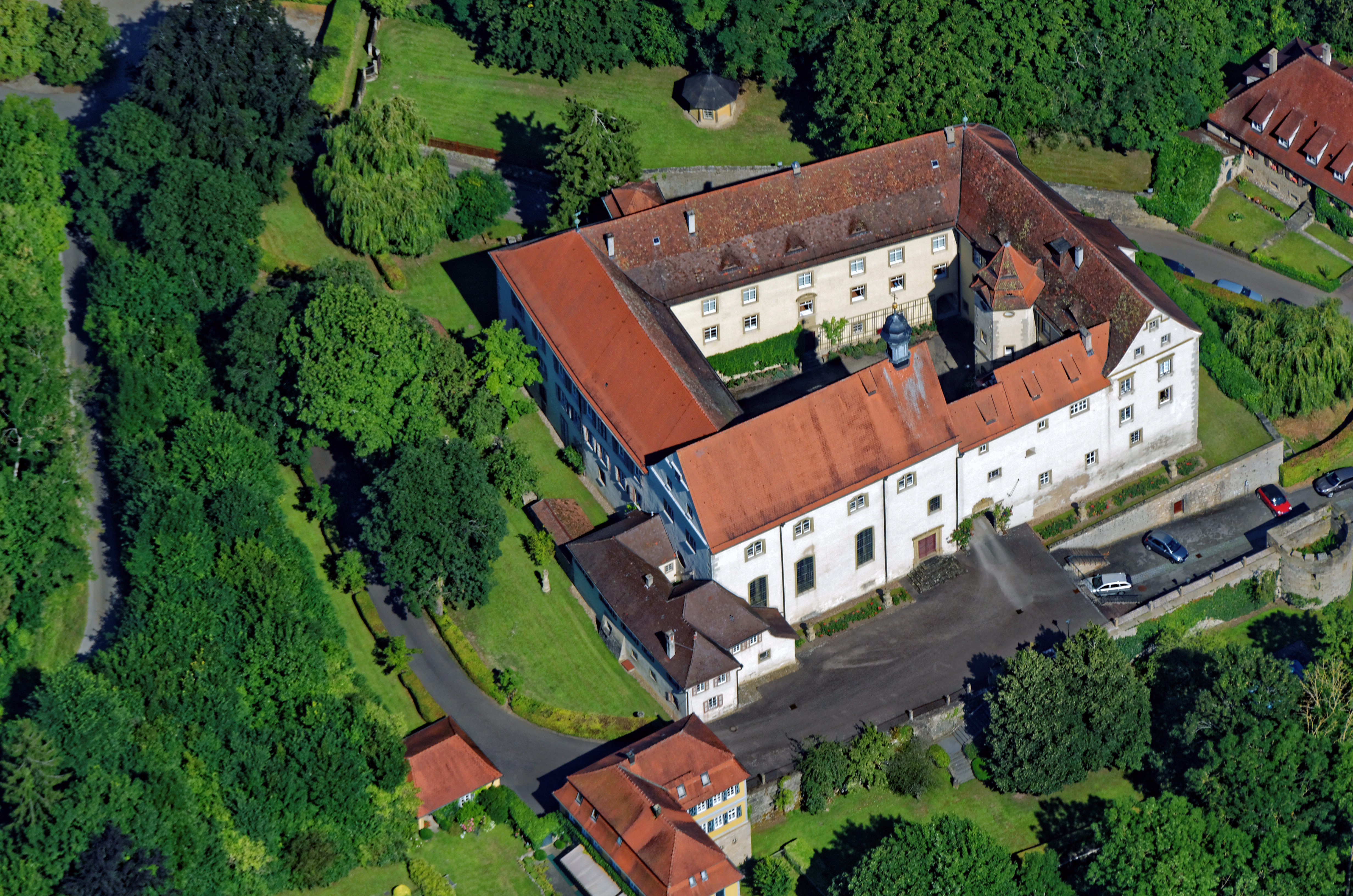 Niederstetten aus dem Flugzeug gesehen.